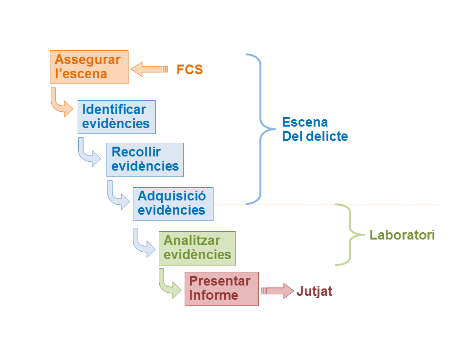 Descriu el cicle de les evidències digitals, des que són recollides fins al lliurament de l'informe pericial al jutjat.